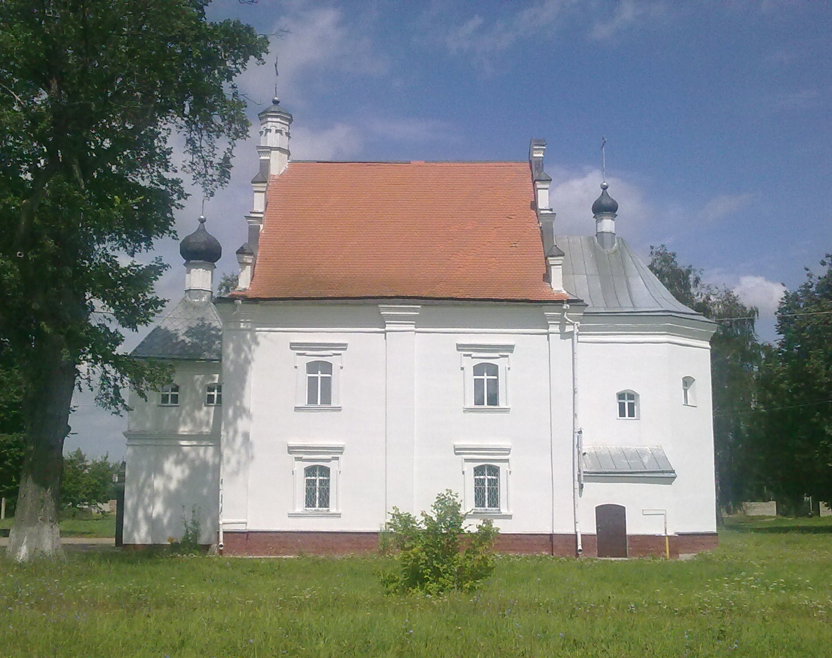 Св. Троицкий храм Кутеинского монастыря